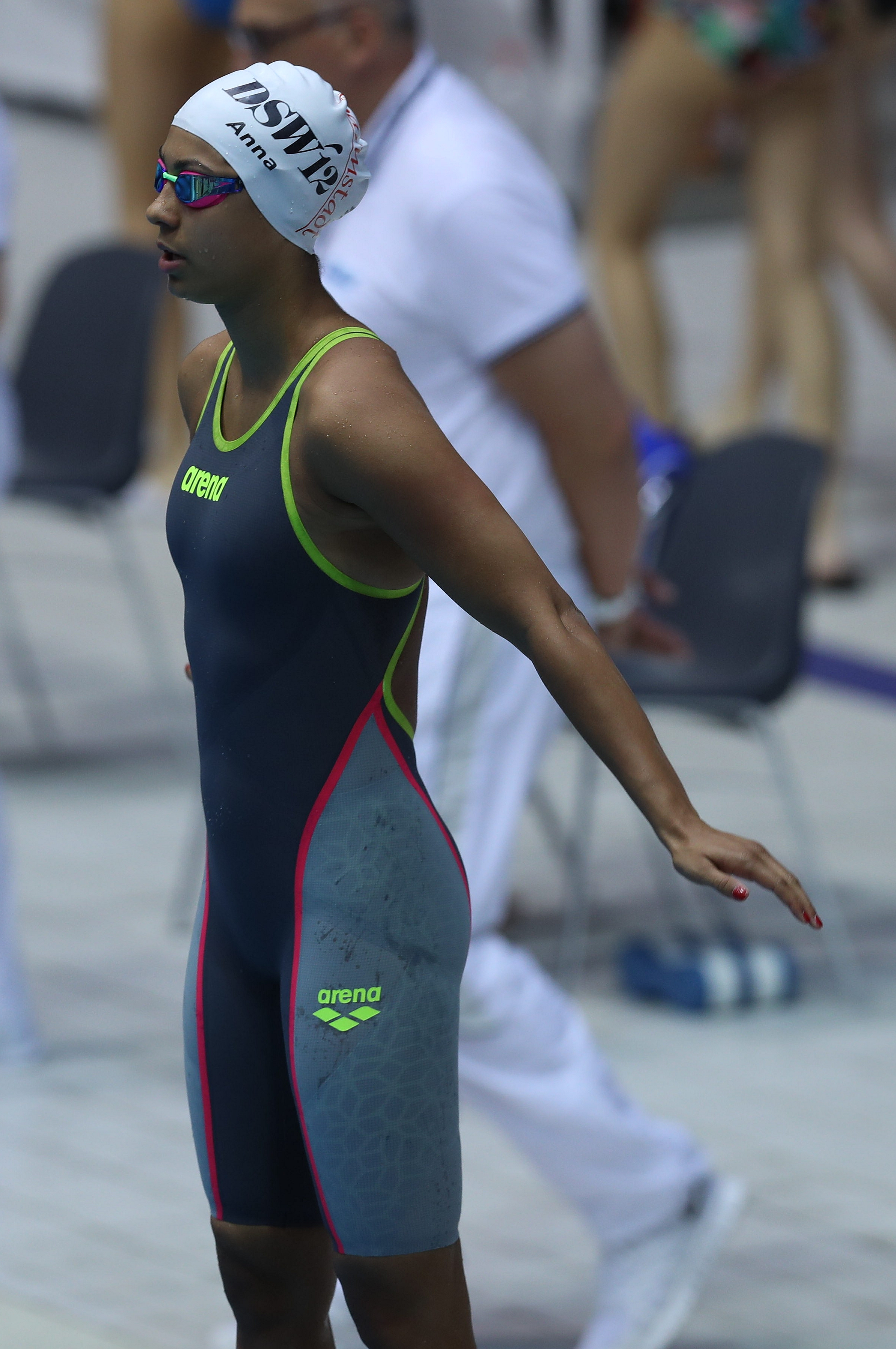 WK 117 50m Brust weiblich Finals am 31. Mai bei den Deutschen Jahrgangsmeisterschaften Schwimmen und Schwimm-Mehrkampf 2018.